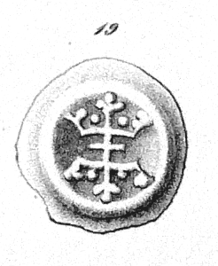 Halb-Pfennig-Brakteat von Magnus Eriksson 1319-1355 König von Norwegen, 1319—1364 König von Schweden. 0,35 g. Feinghalt 125 ‰.